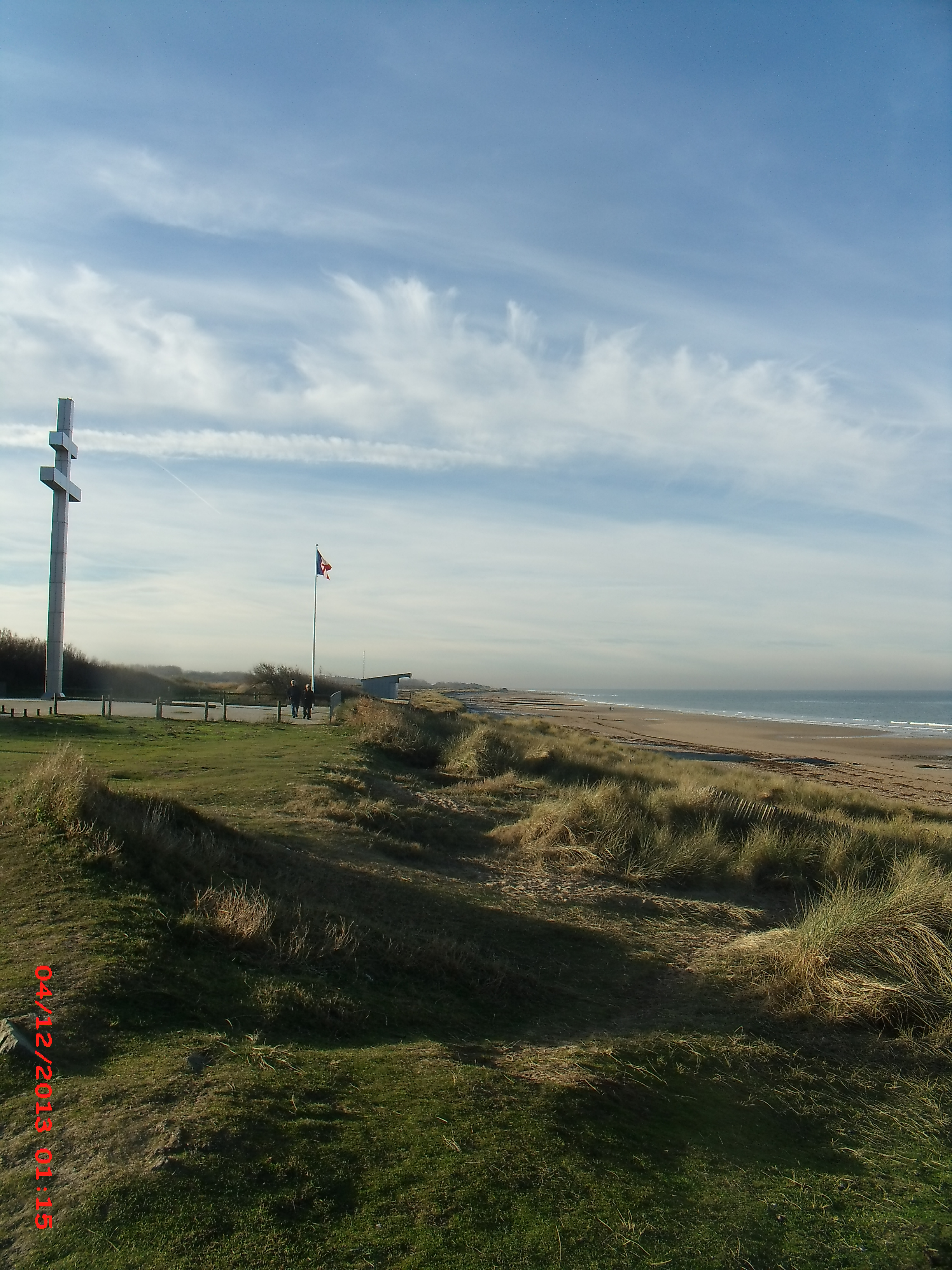 Plage de Juno Beach avec la croix de Lorraine marquant le lieu ou le général de Gaulle a débarqué lors du Débarquement allié de 1944.